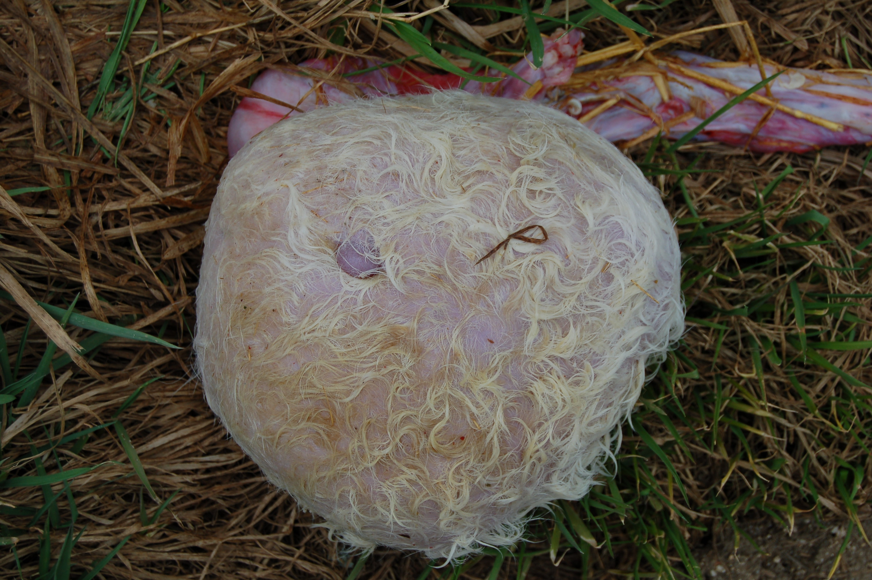 Zwillingsmissbildung bei Fleckviehkuh, rückseitig